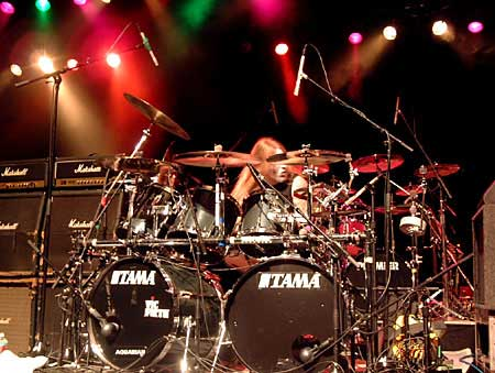 Zbigniew Robert Inferno Promiński from Behemoth.